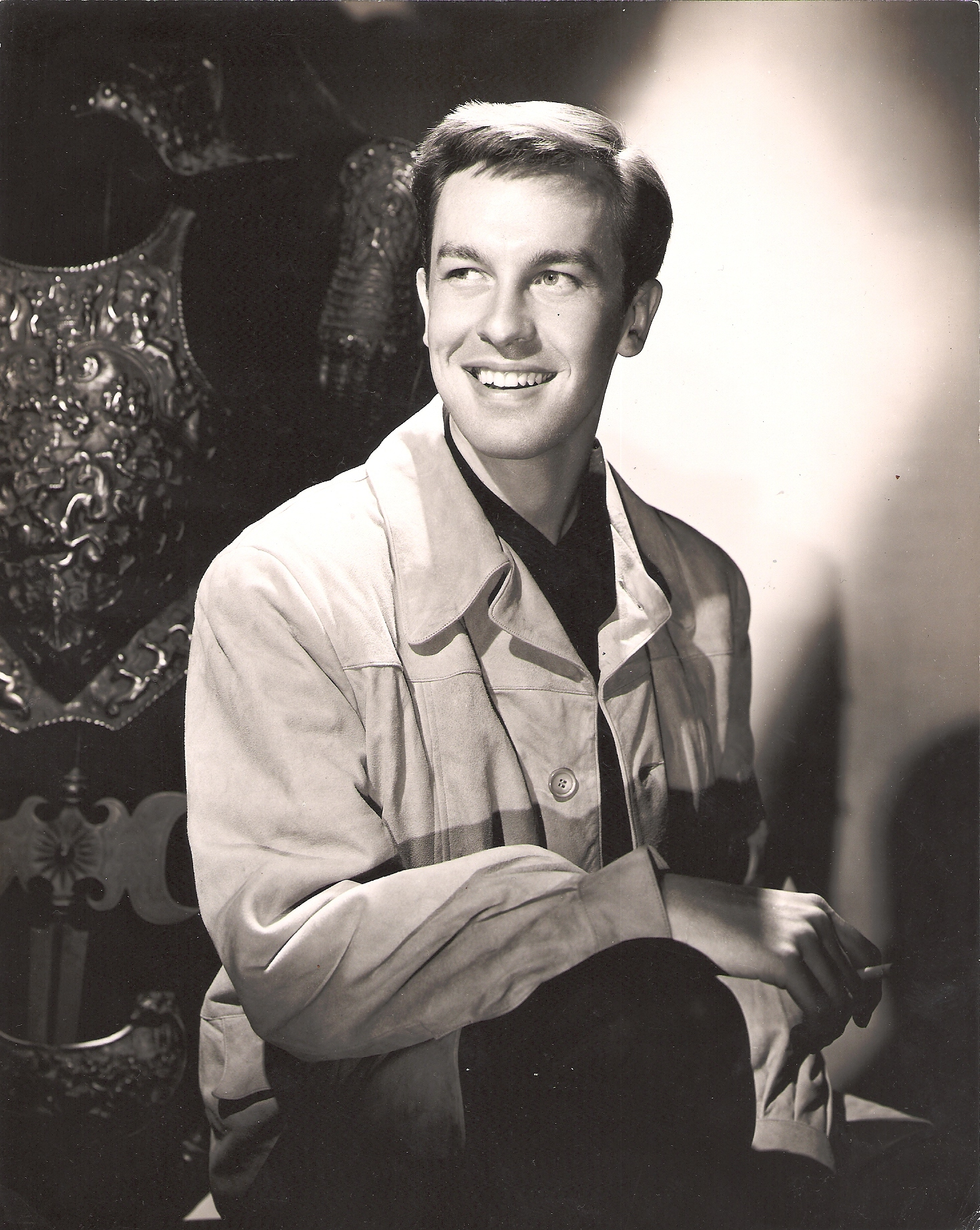 John_Dall.jpg